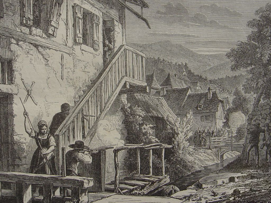 paysans des Vosges faisant le coup de feu